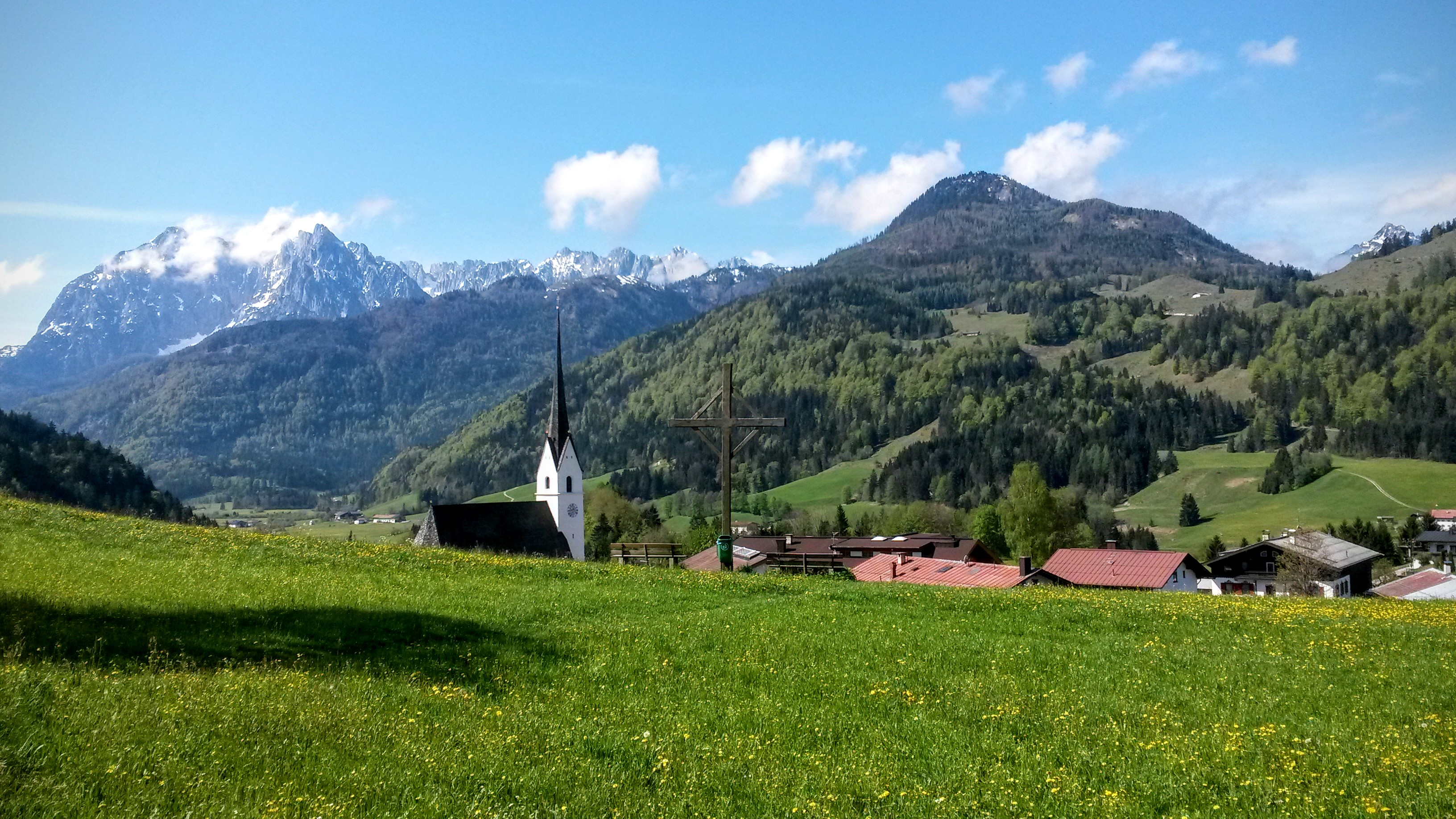 Schwendt - Blick zum Wilden Kaiser